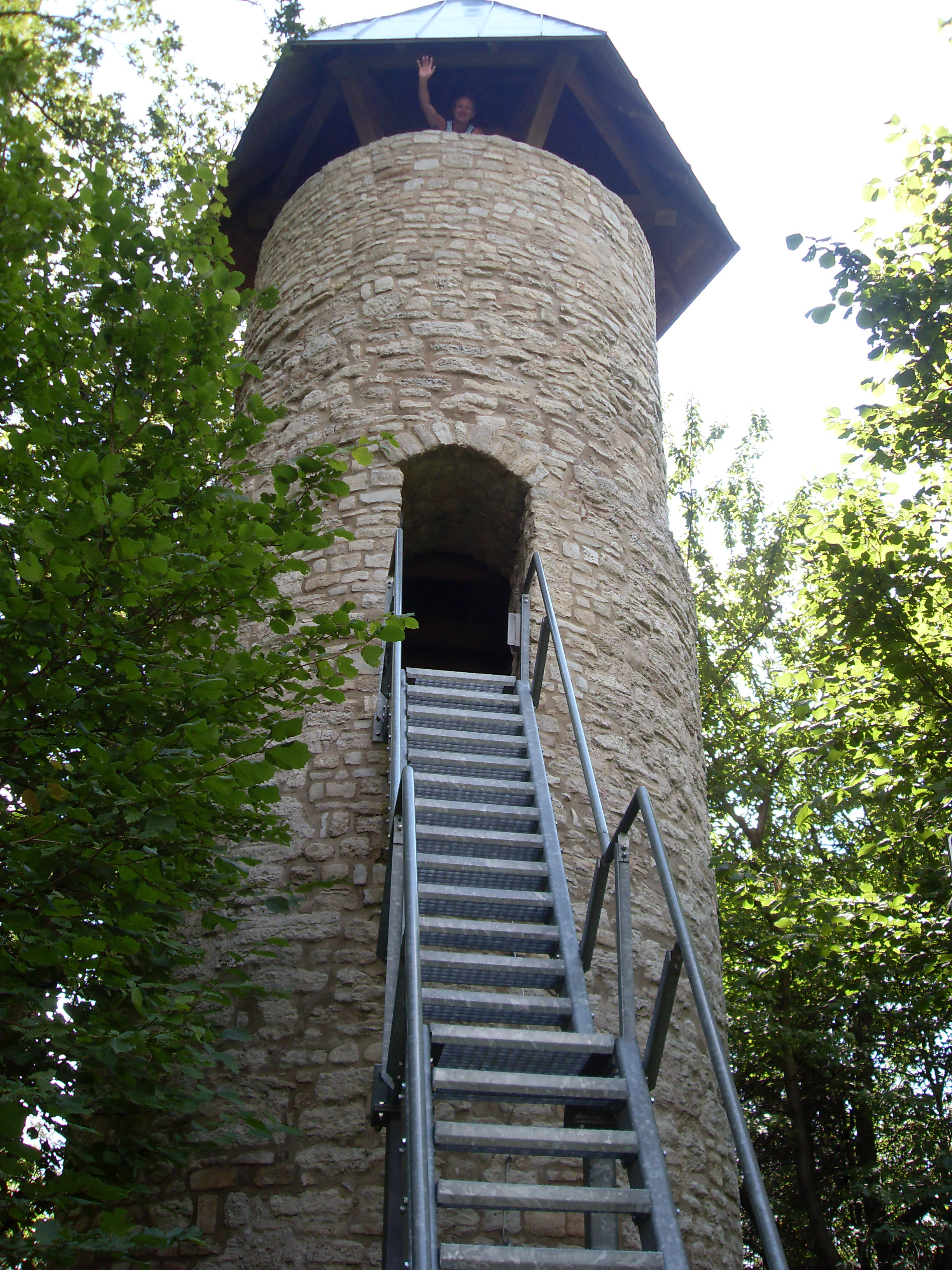 Ibergwarte mit Treppe